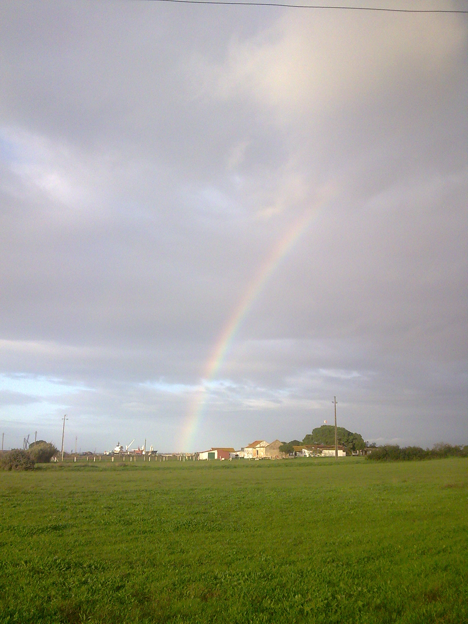 Alhos Vedros (Campo)